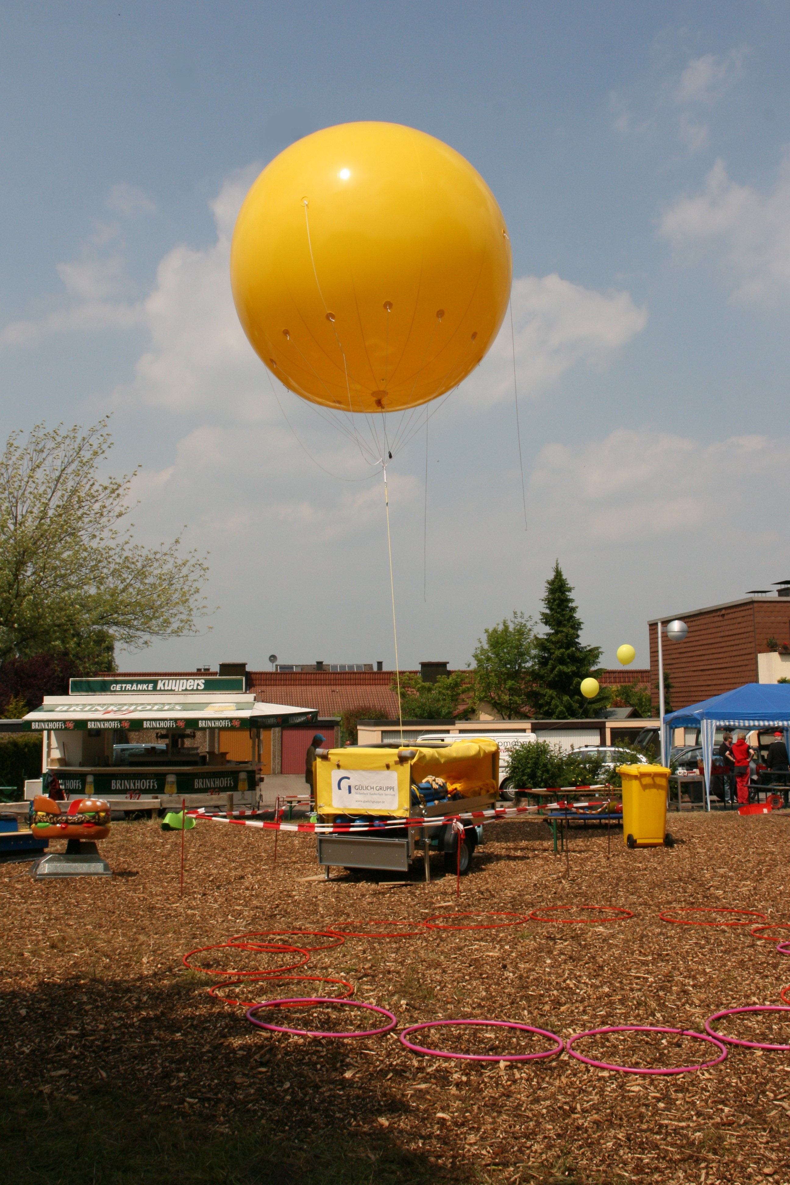 Schachtzeichen an der ehemaligen Zeche Vereinigte Hamburg und Franziska, Schacht Theodor, in Witten-Stockum